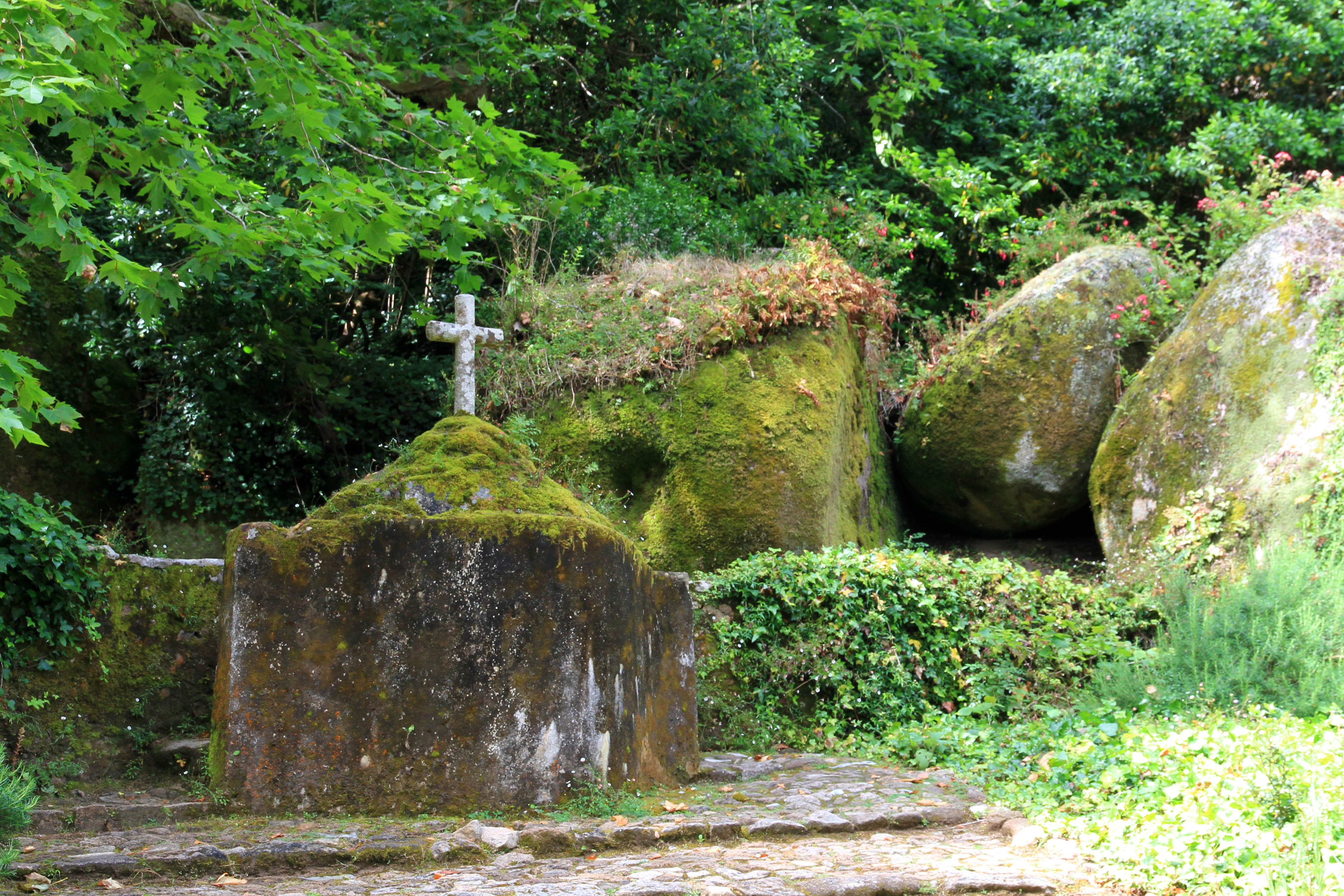 Дворик при входе в Монастырь капуцинов